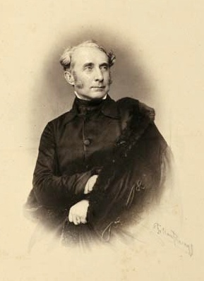 Eduard von Yrsch (1797-1862) bayerischer Hofmarschall und Hoftheaterintendant, Foto von Franz Hanfstaengl